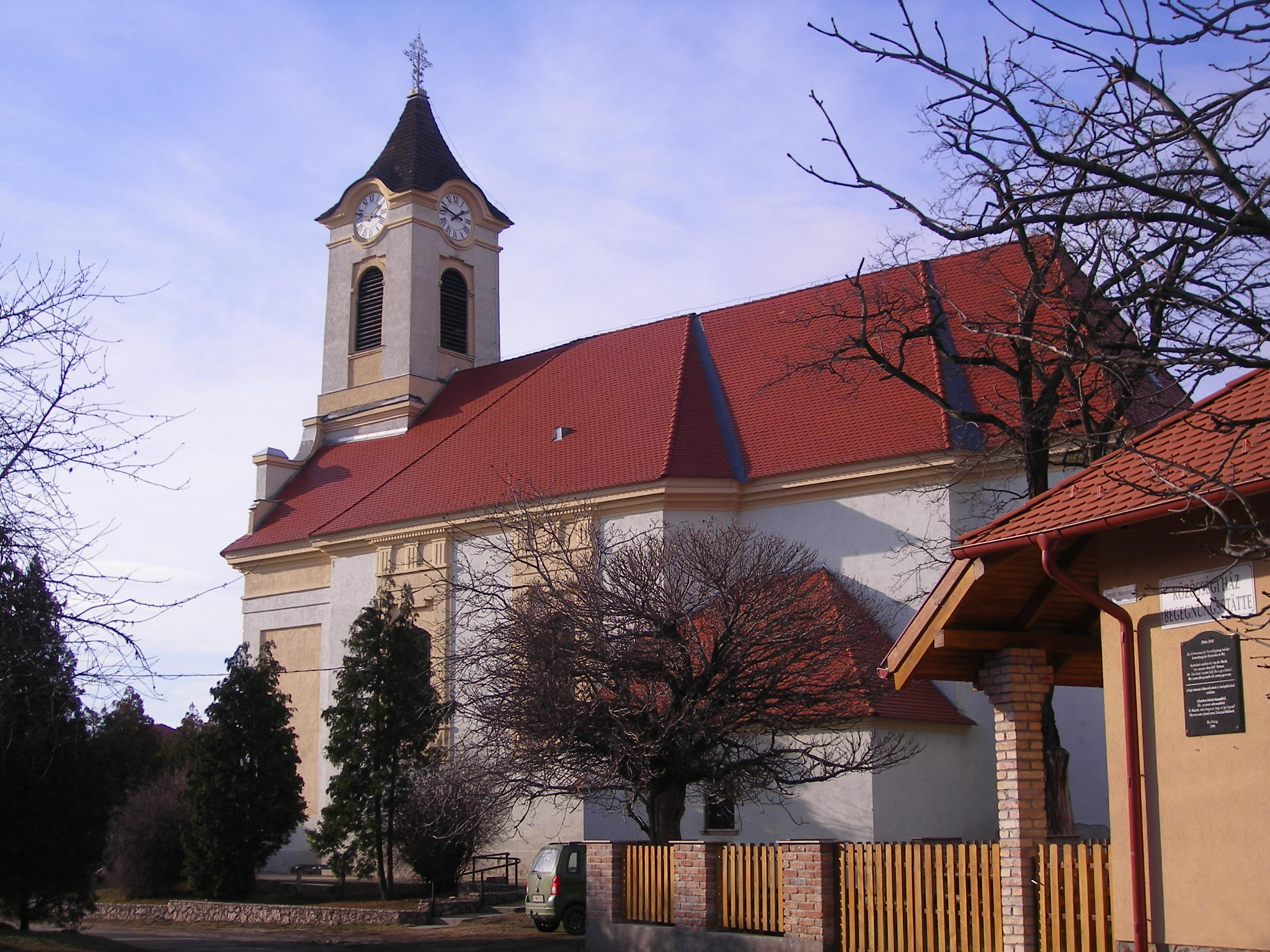 Baj - katolikus templom